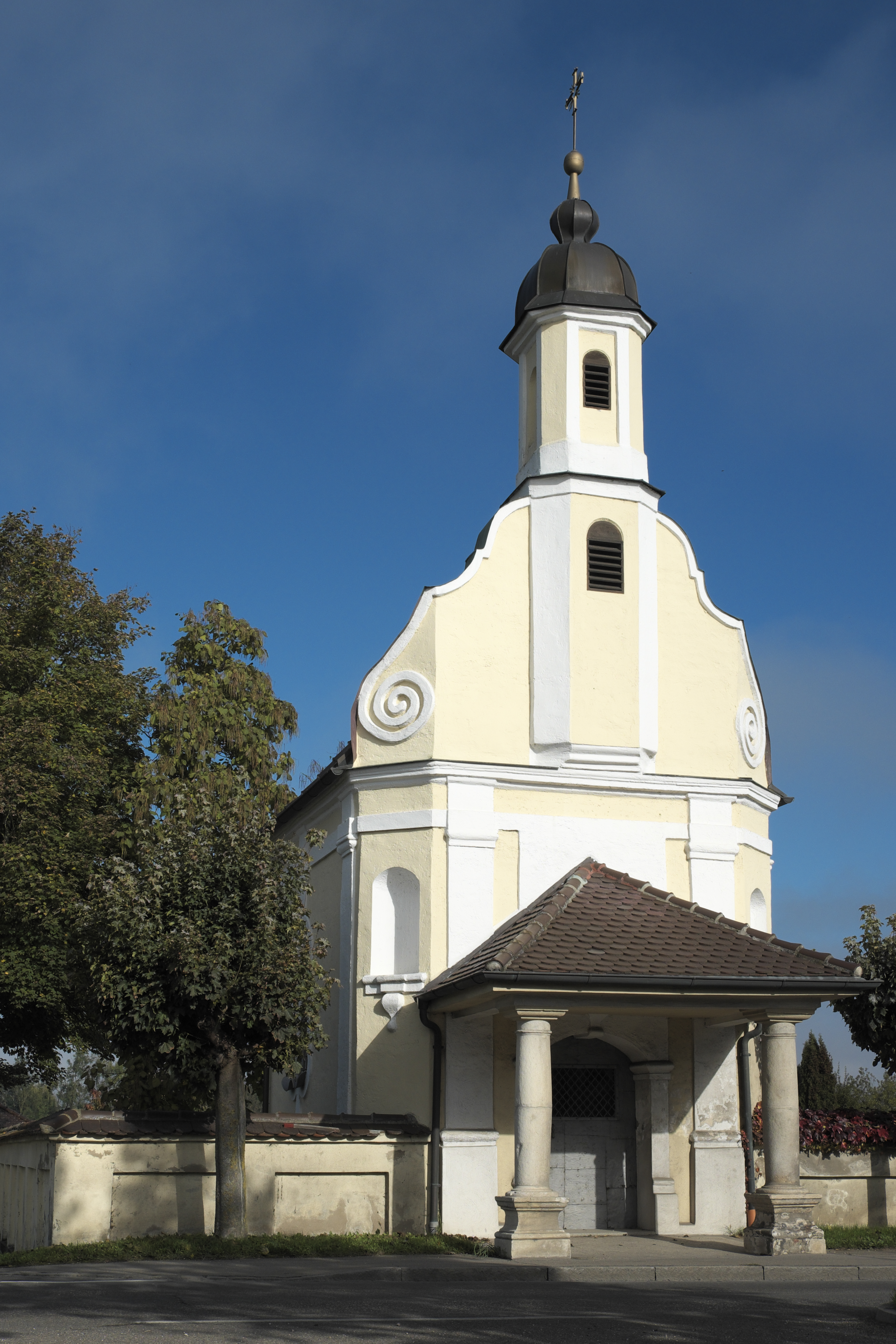 Katholische Friedhofskapelle Hl. Kreuz in Steinheim, einem Stadtteil von Dillingen an der Donau (Bayern)